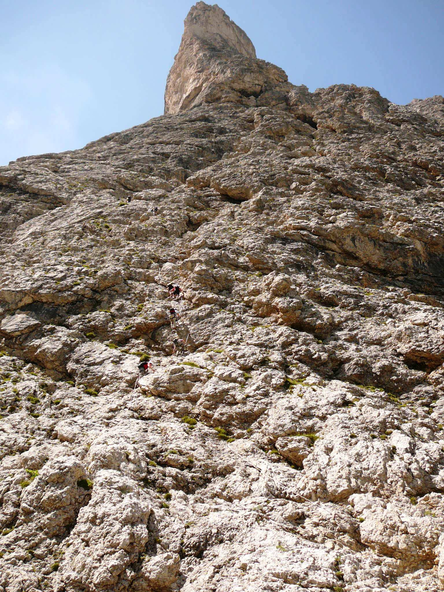 ferrata tridentina, seconda parte, Torre Exner